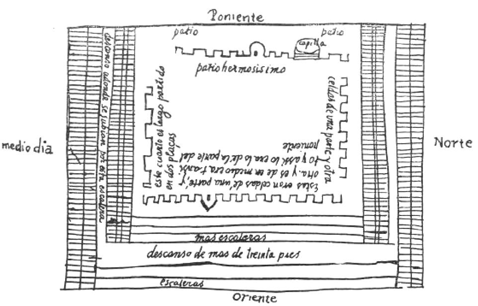 Croquis de Fray Diego de Landa del lugar que ocupó el templo de San Francisco.